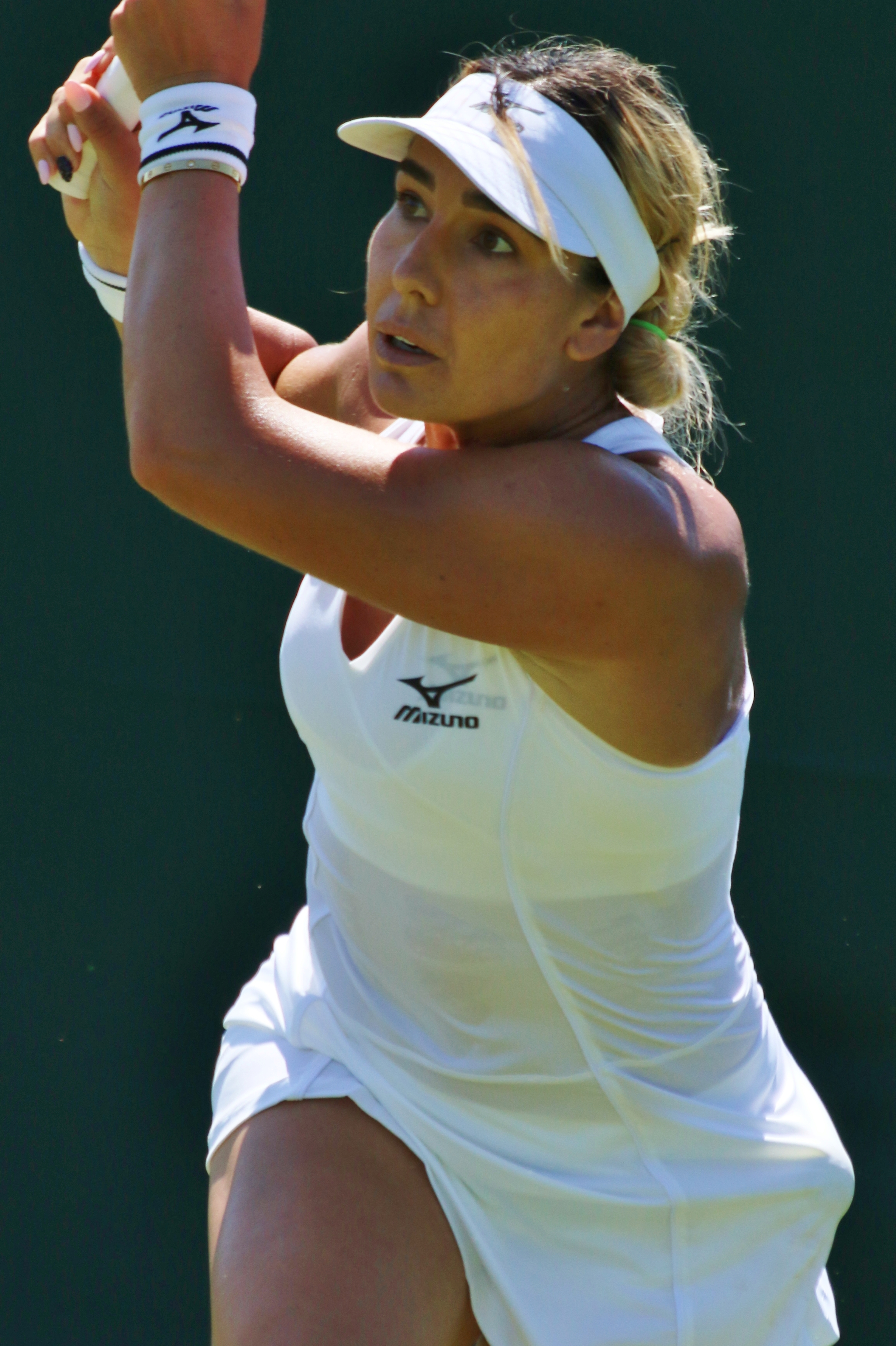 Kostova WMQ18 (7)